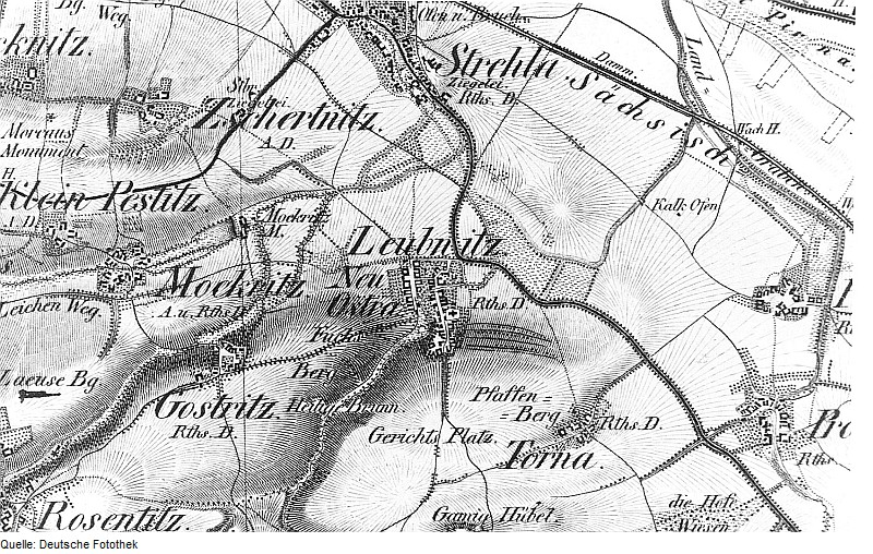 Original image description from the Deutsche Fotothek Dresden-Mockritz. Oberreit, Sect. Dresden, 1821/22